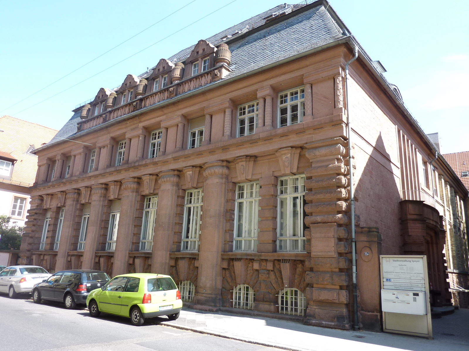 Gebäude des Stadtarchivs Speyer